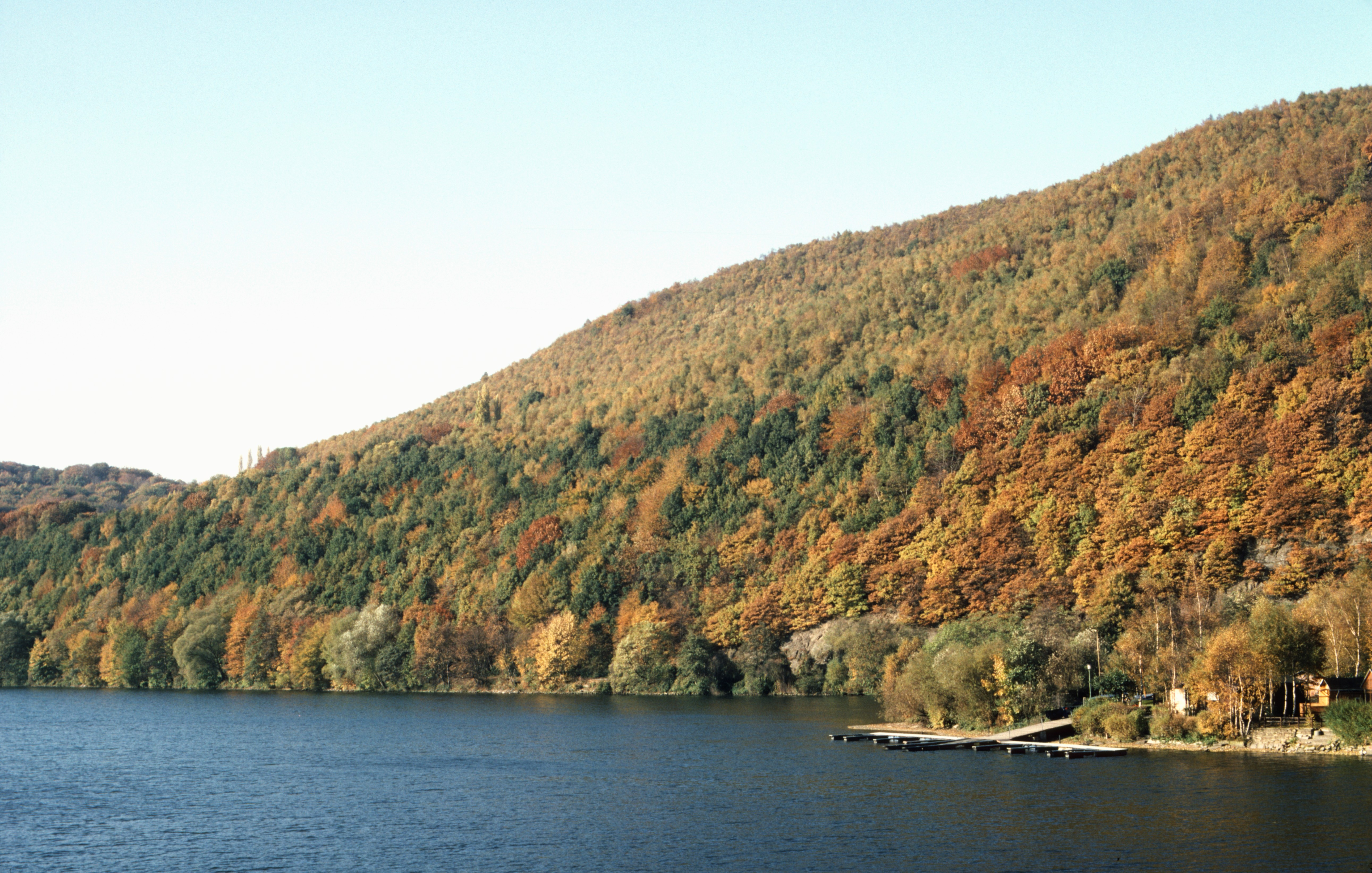 Herbststimmung am Hengsteysee, Blick von der Ruhrbrücke Dortmunder Straße nach Nordwesten zum Klusenberg (Dortmund)